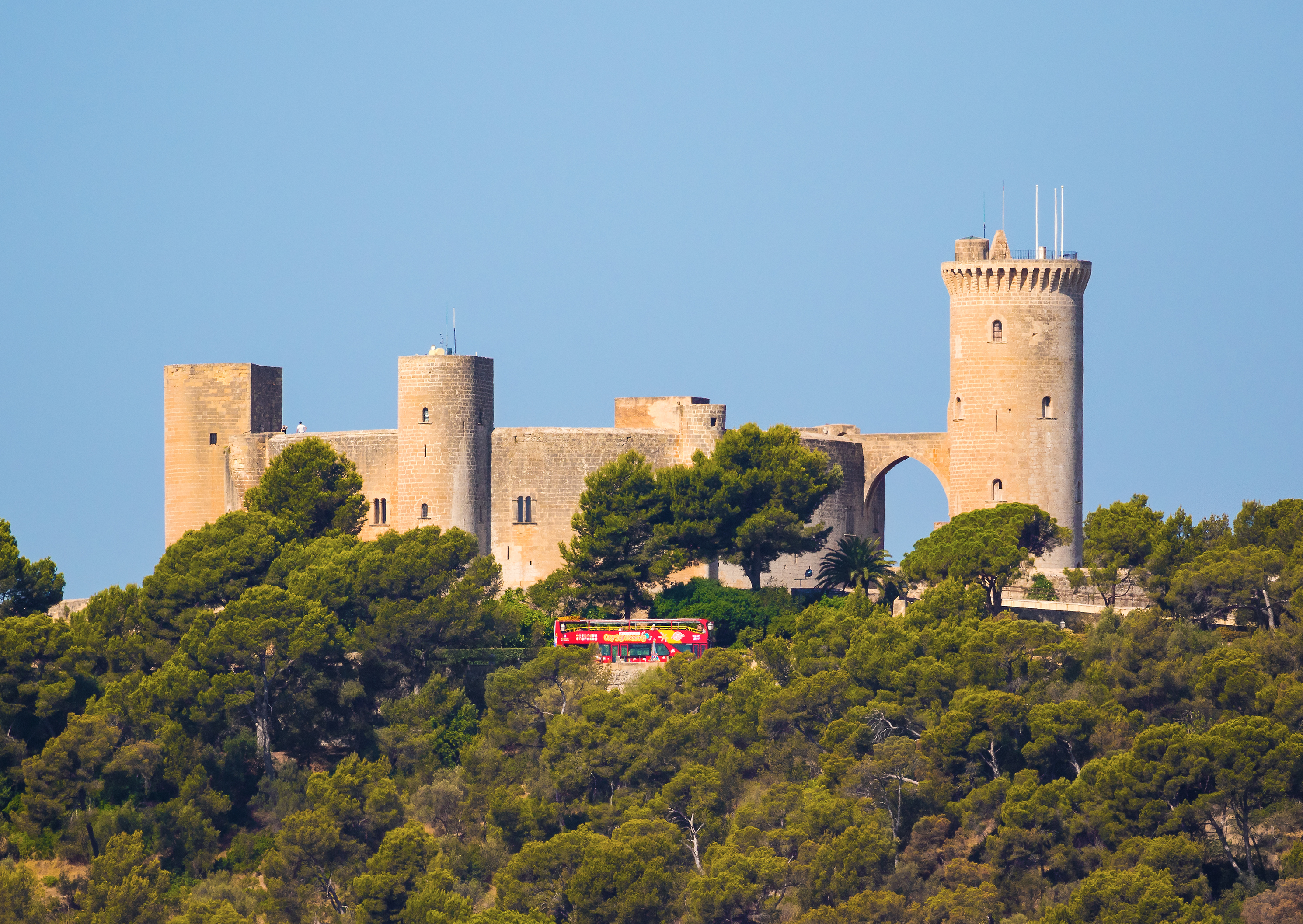 Castell de Bellver in Palma, Mallorca, Spanien